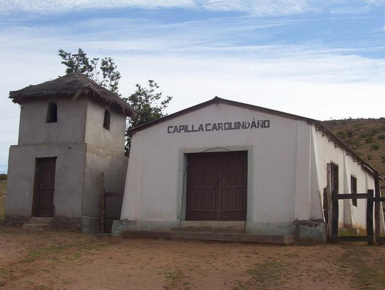 iglesia de Carquindaño